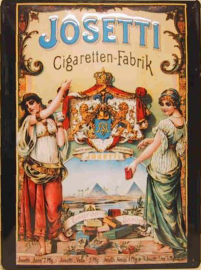 Emailletafel Josetti Cigarettenfabrik Berlin, 30 x 40 cm; Preis der JUNO-Zigarette zwei Pfennig